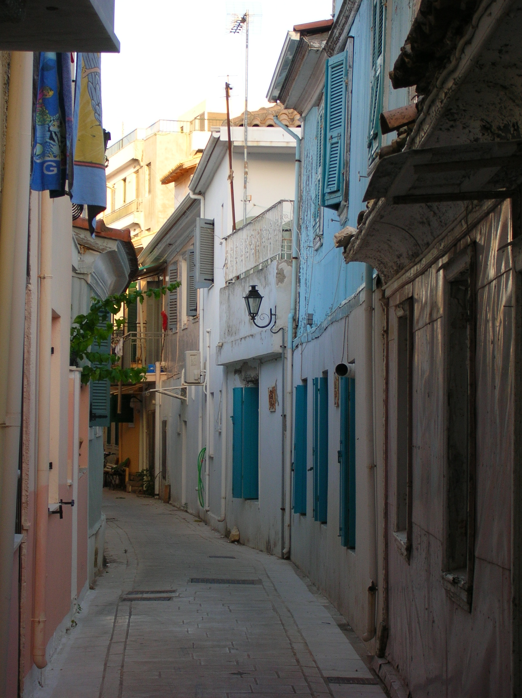 Rues typiques de Lefkas, sur l'île du même nom (Grèce)